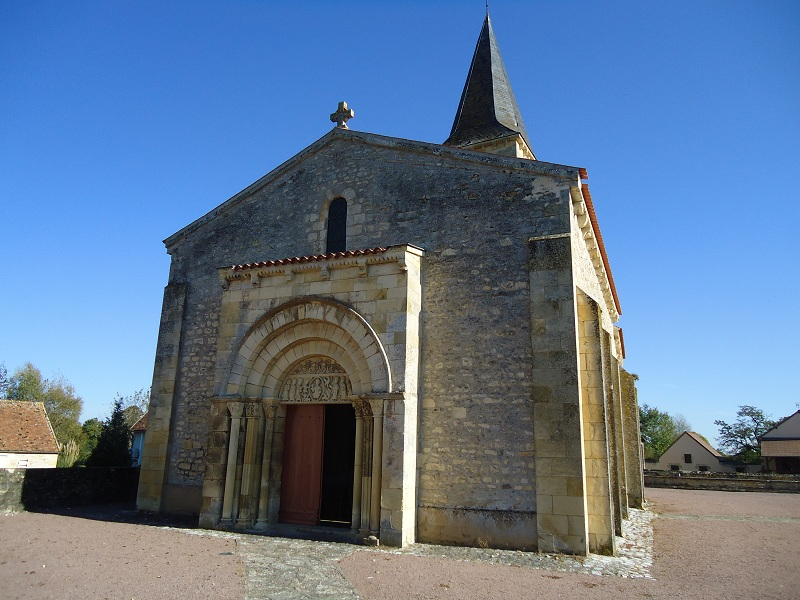 L'église de Mars-sur-Allier